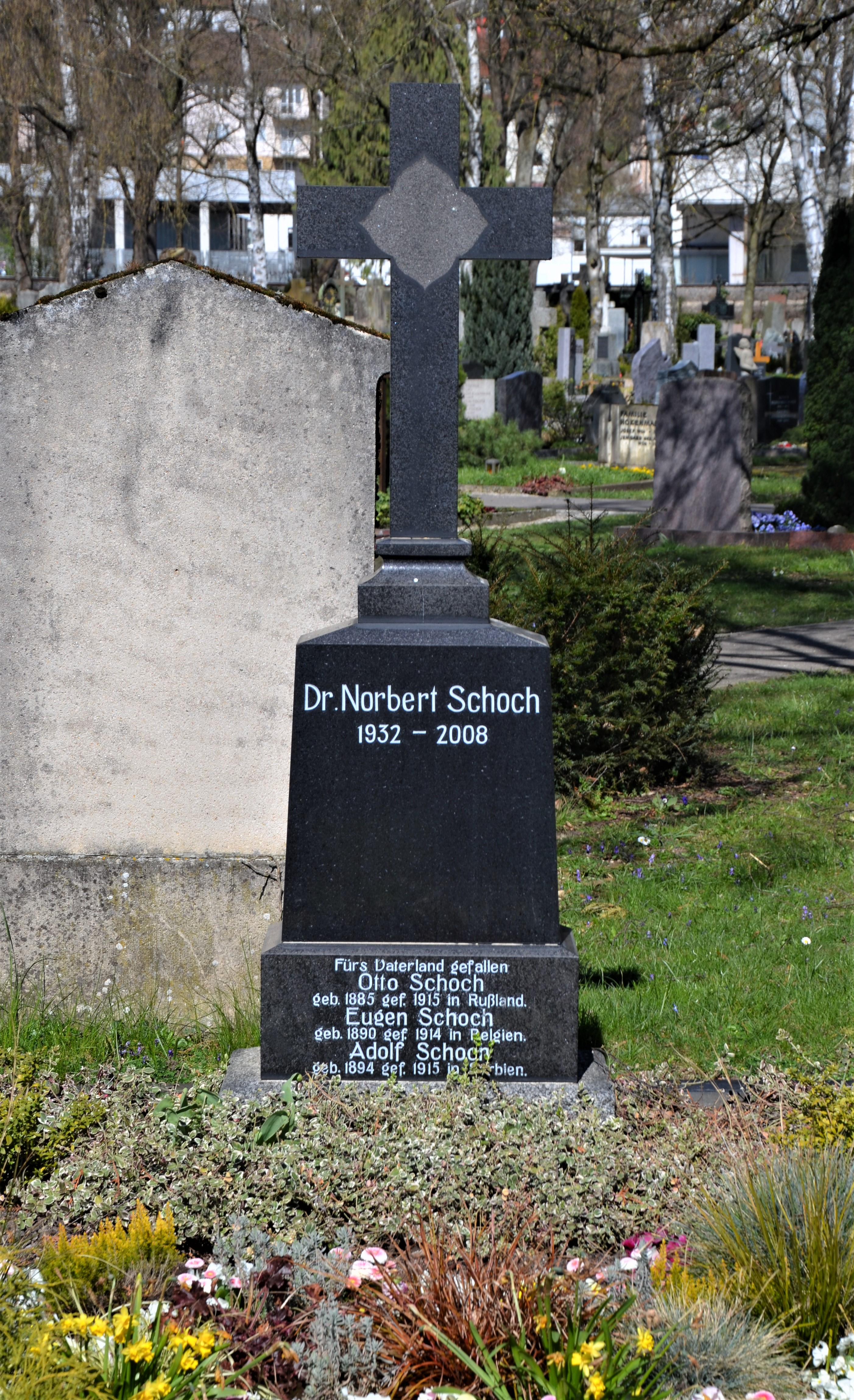 Grab des Oberbürgermeisters Nobert Schoch auf dem Gmünder Leonhardsfriedhof